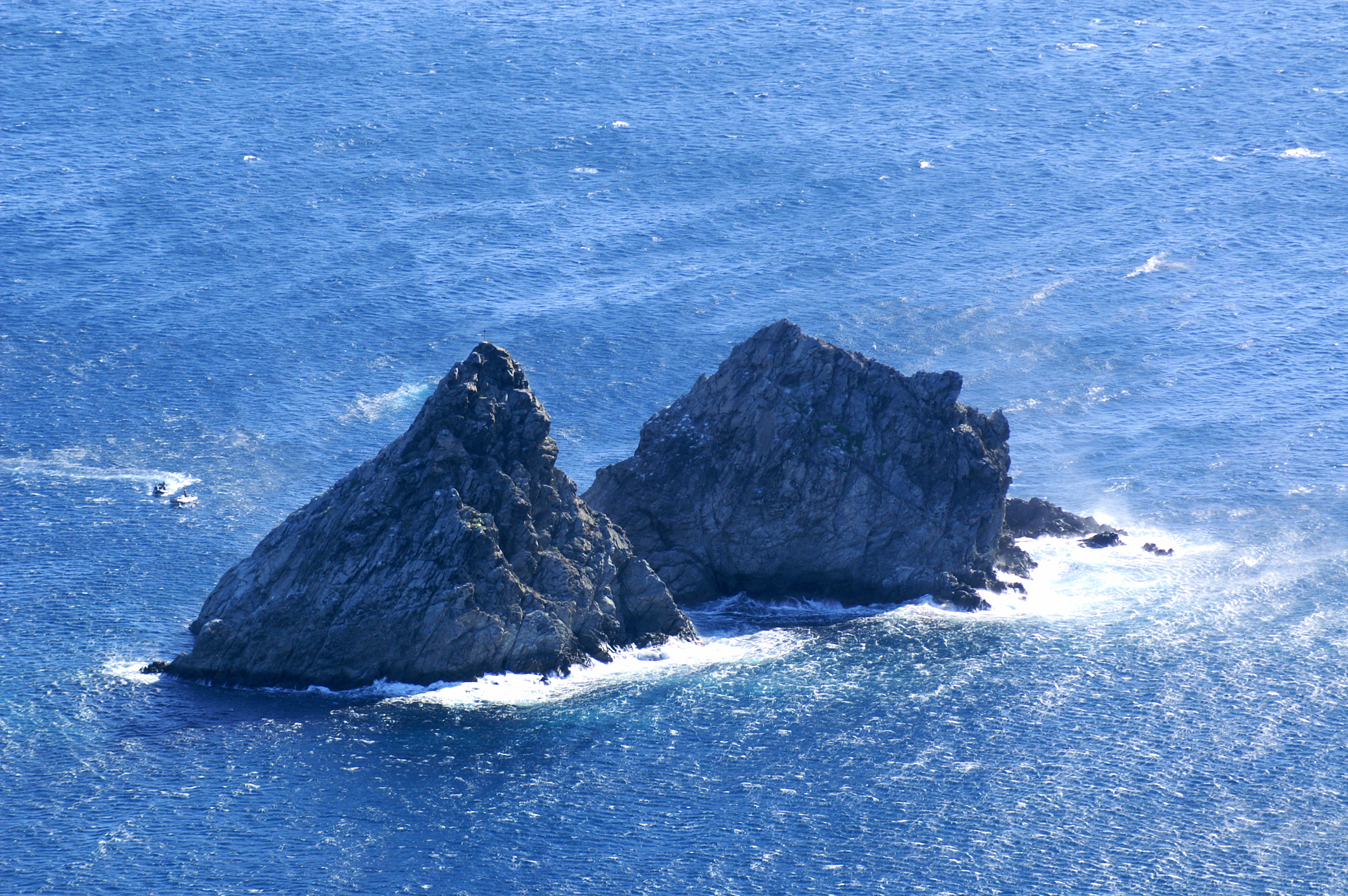 Îlots des Deux Frères